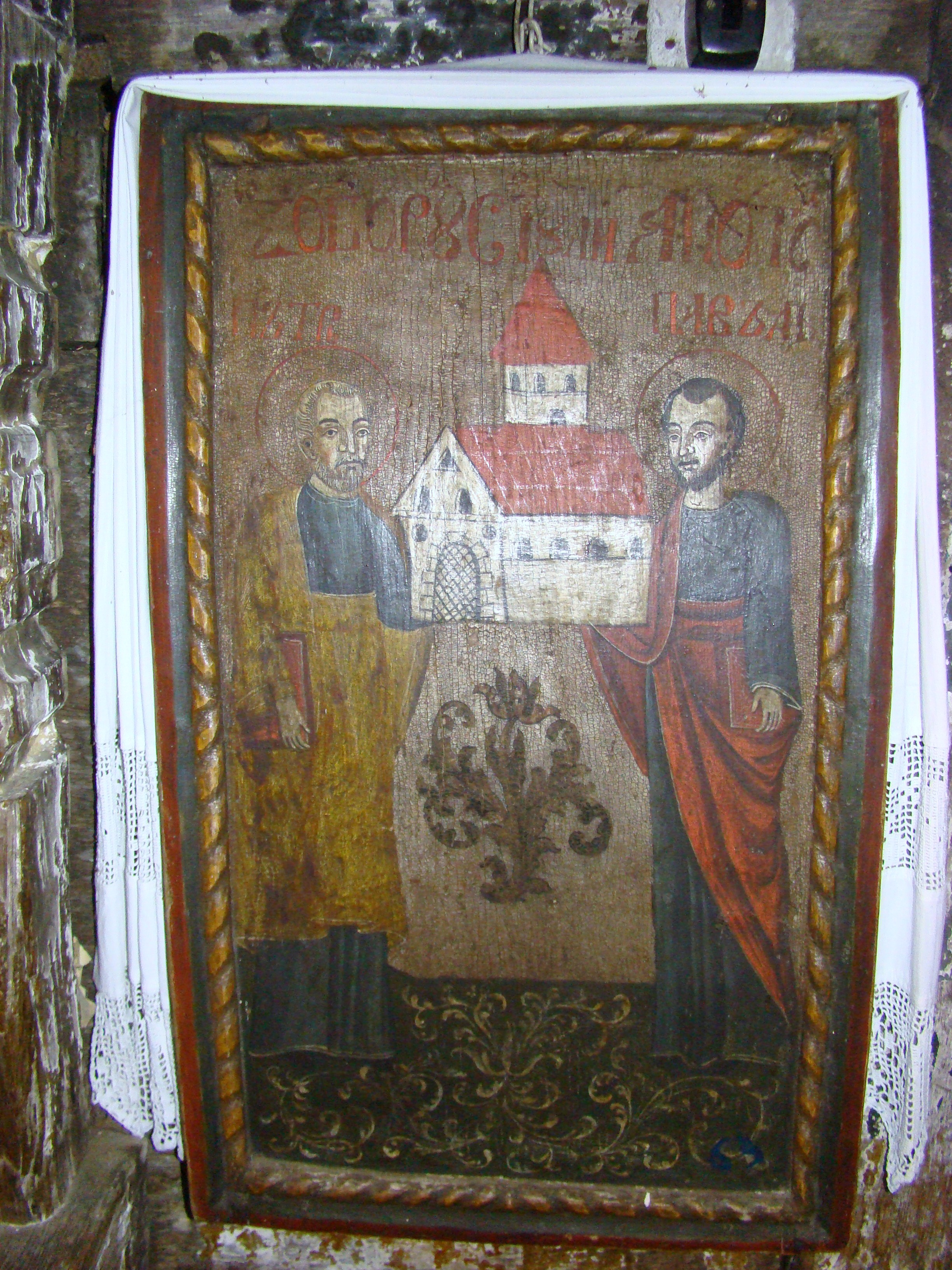 Biserica de lemn „Sfântul Nicolae” din Ciubăncuța